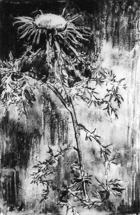 Silberdistel Lithografie